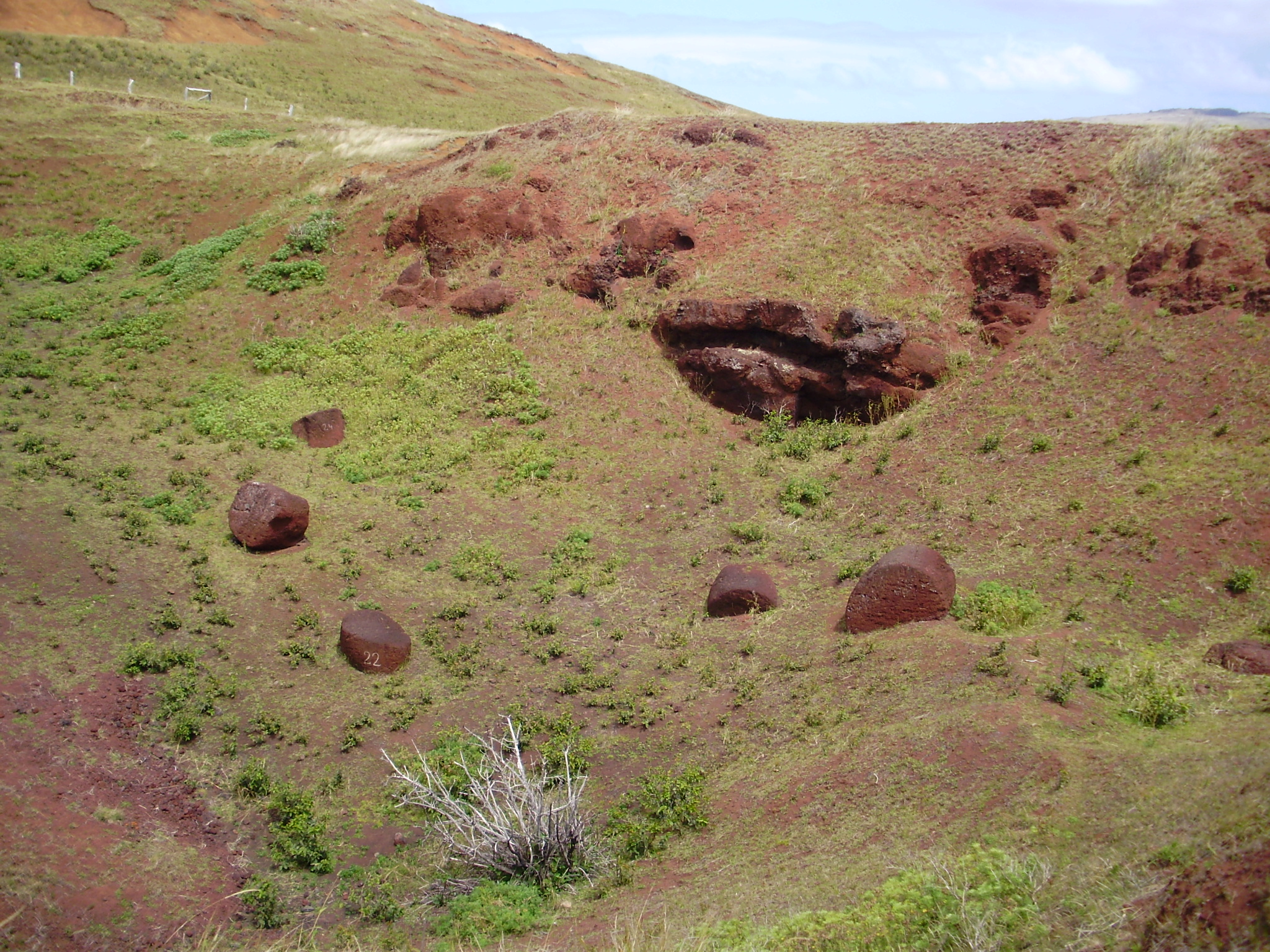 Cantera Puna Pau, en Isla de Pascua, Chile.